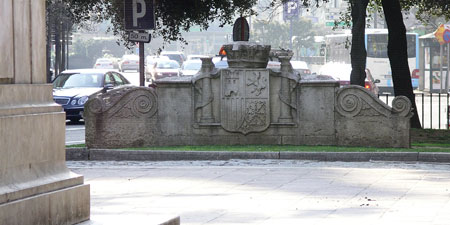 Escudo de la Segunda Republica en Santander.